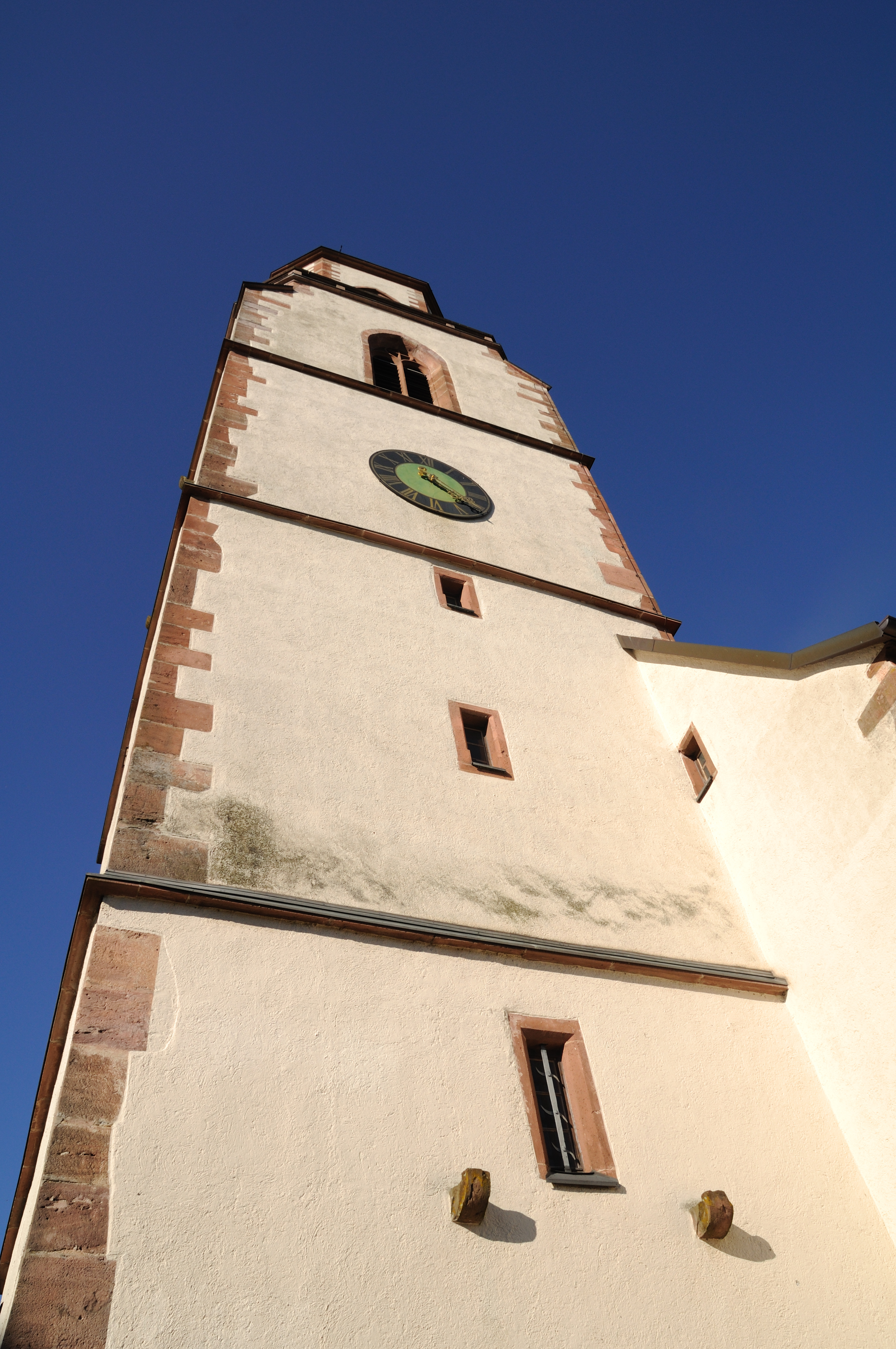 Rheinfelden-Eichsel: St. Gallus, Glockenturm